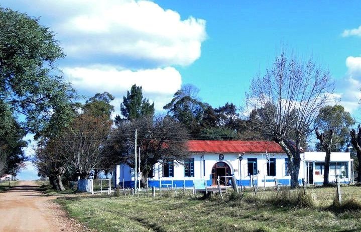 Escuela Nº 17 "José María Firpo" de Piñera (Uruguay). Fundada en 1902.